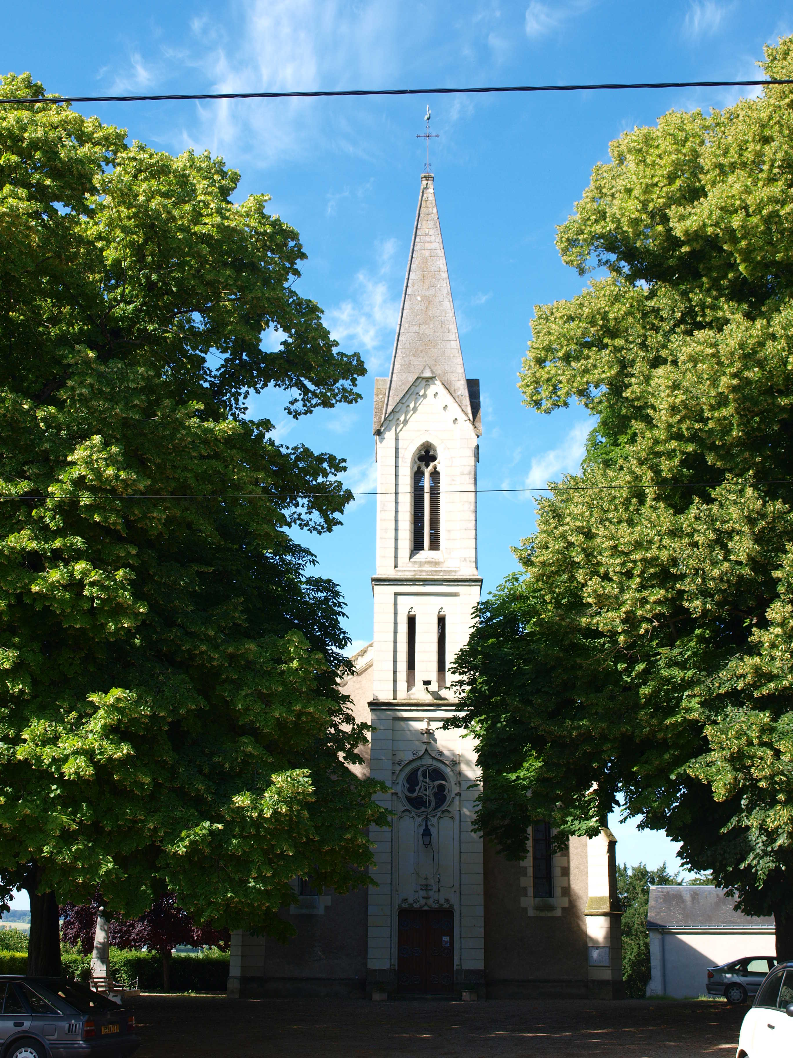 Trogues (Indre-et-Loire, France) , l'église.